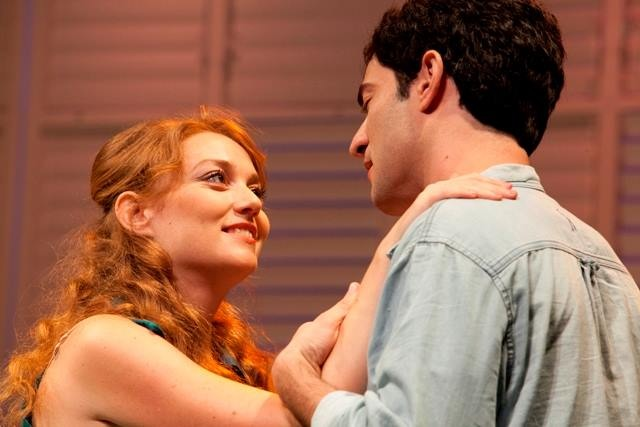 רויטל זלצמן ונדב נייטס בהצגה משאלה אחת ימינה